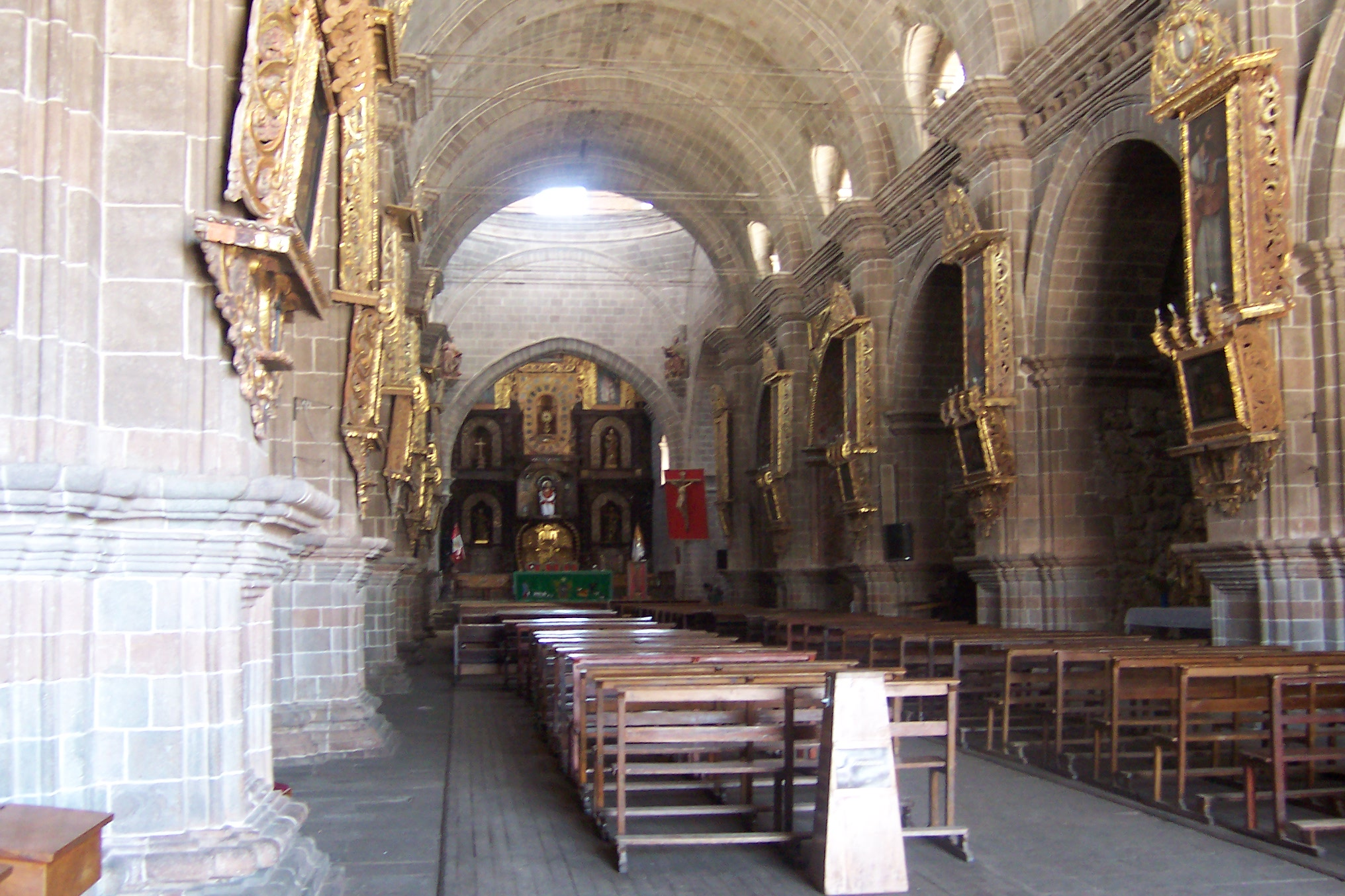 Juli, capital de la provincia de Chucuito. Vista interior de la catedral, nave principal y altar mayor. Autor: Alfredobi Fecha: Agosto 2006